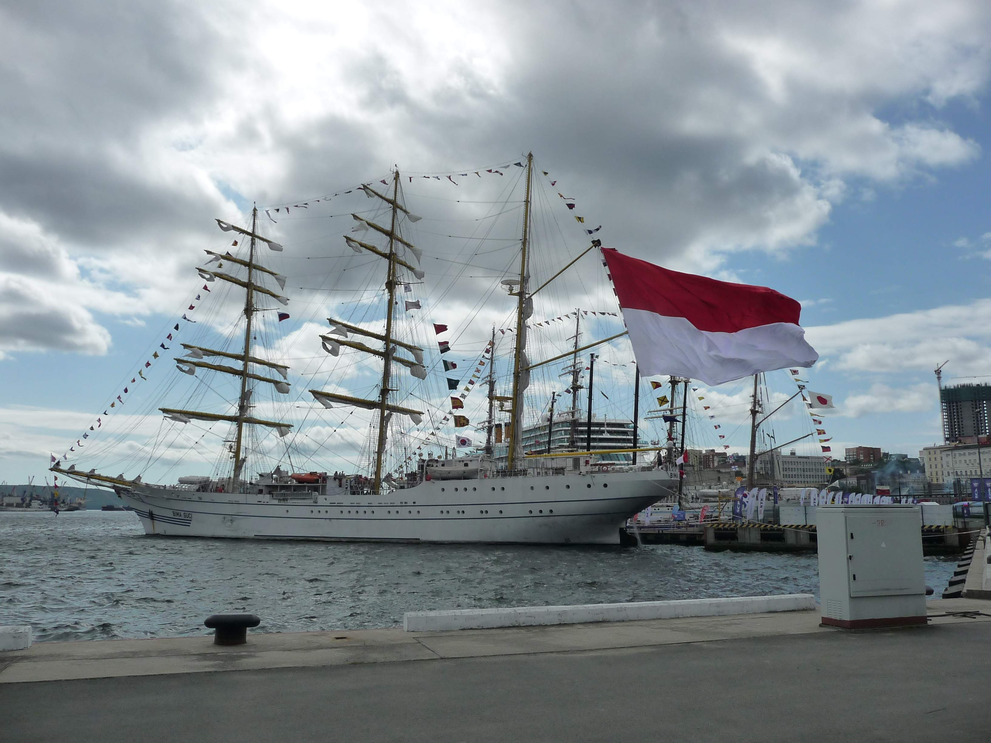 Учебный парусный корабль ВМС Индонезии «Bima Suci» во Владивостоке после первого этапа Дальневосточной регаты парусных кораблей, 2018-09-12